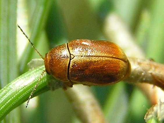 Cryptocephalus pini, zmróżka sosnowa, Polska